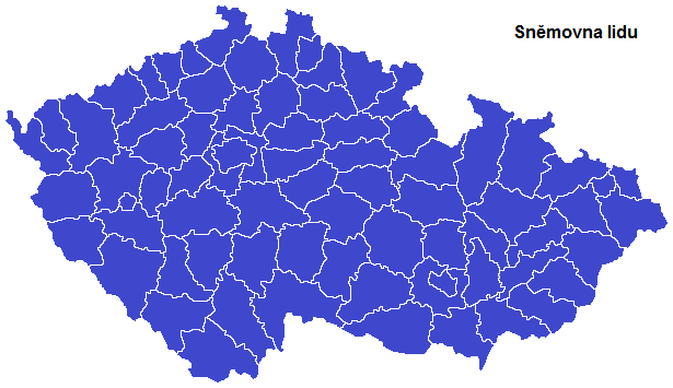 Volby do Sněmovny lidu Federálního shromáždění v roce 1992 - vítězné strany podle okresů (modrá Koalice ODS a KDS)